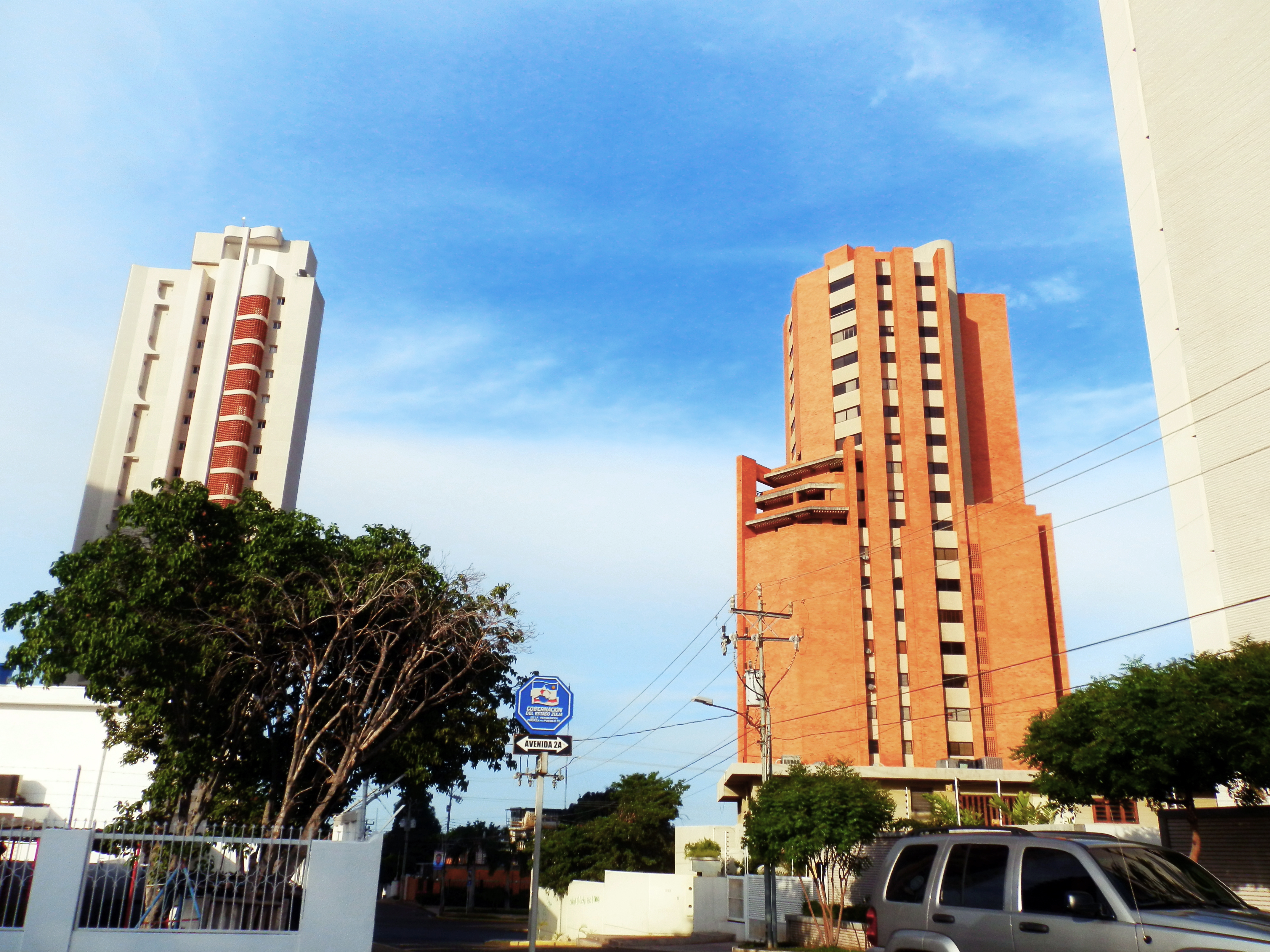 Edificios de la Avenida El Milagro Maracaibo, Venezuela, Arquitectura marabina